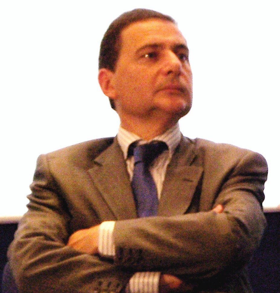 Eric Besson, secrétaire d’Etat chargé de la prospective, de l'Evaluation des politiques publiques et du développement de l’Economie numérique aux Assises du Numérique